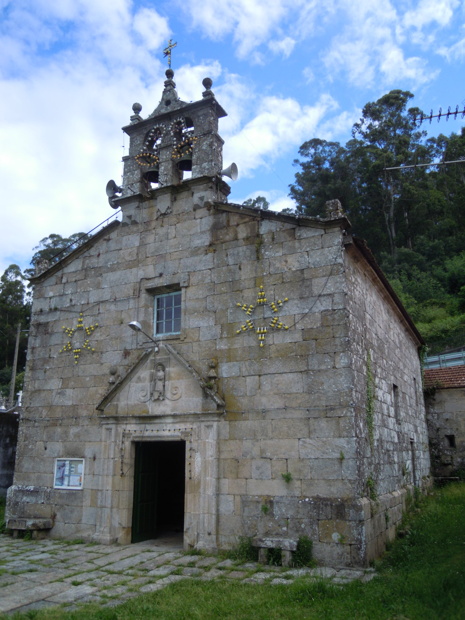 Igrexa parroquial de San Román de Saxamonde (Redondela)